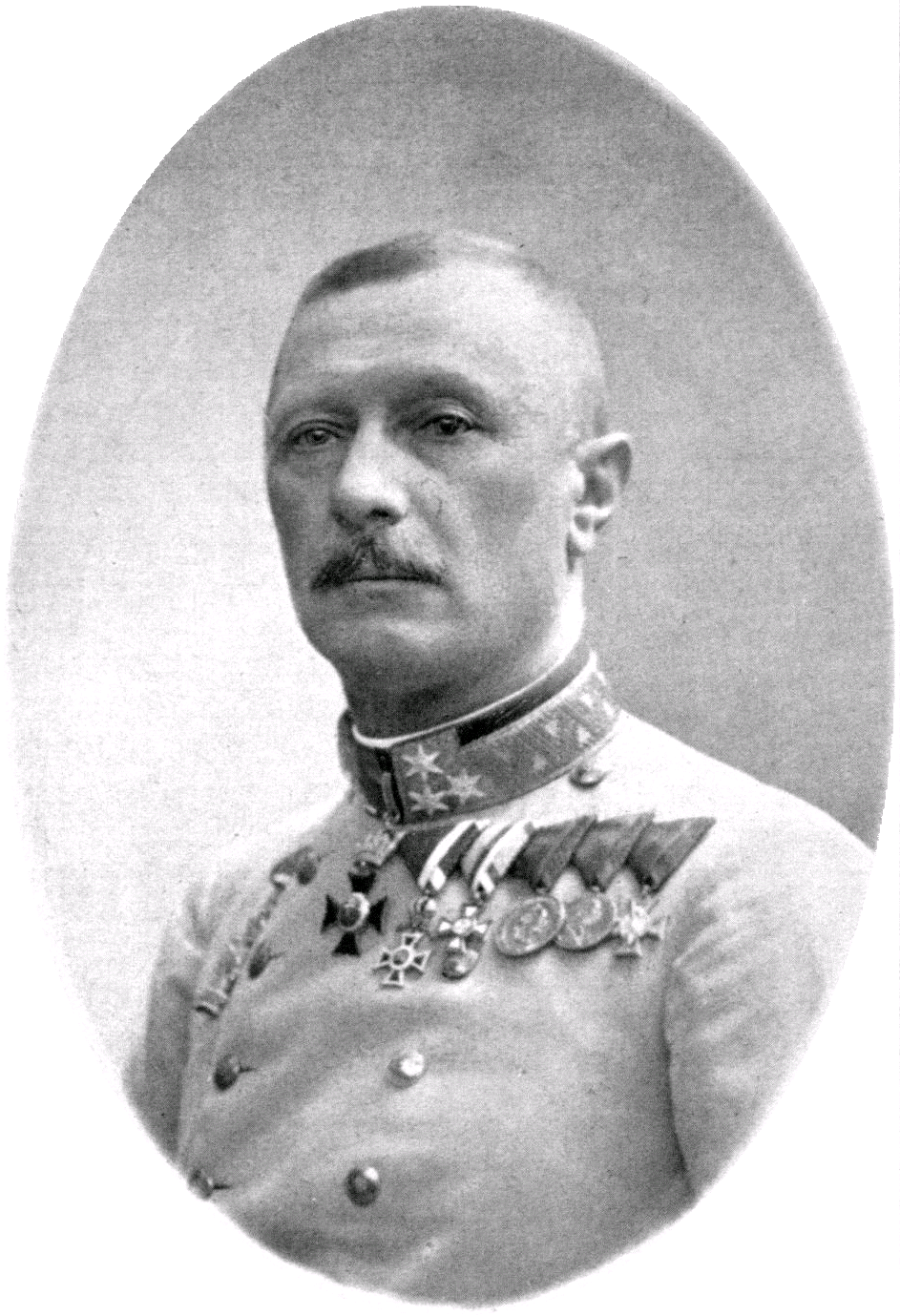 Oskar Potiorek (1853-1933), Austrian-Hungarian general and politician